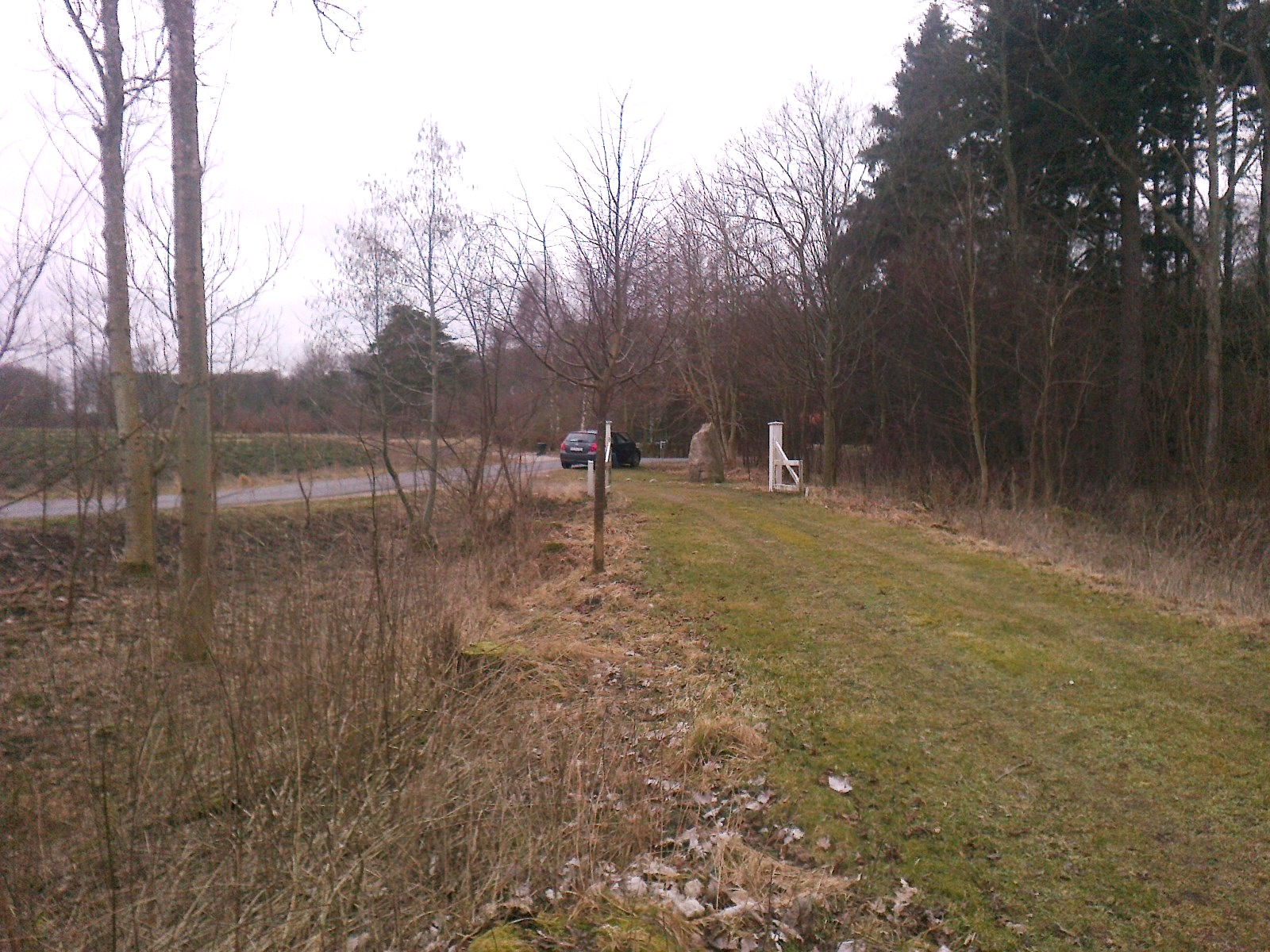 Tracéet krydser Rødeled Vej - her lå Sostrup trinbræt